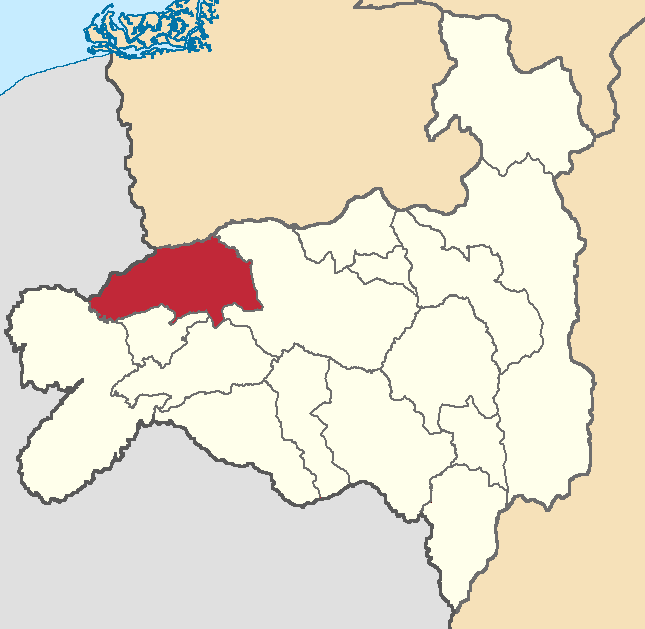 Mapa localizador del cantón en Loja, Ecuador